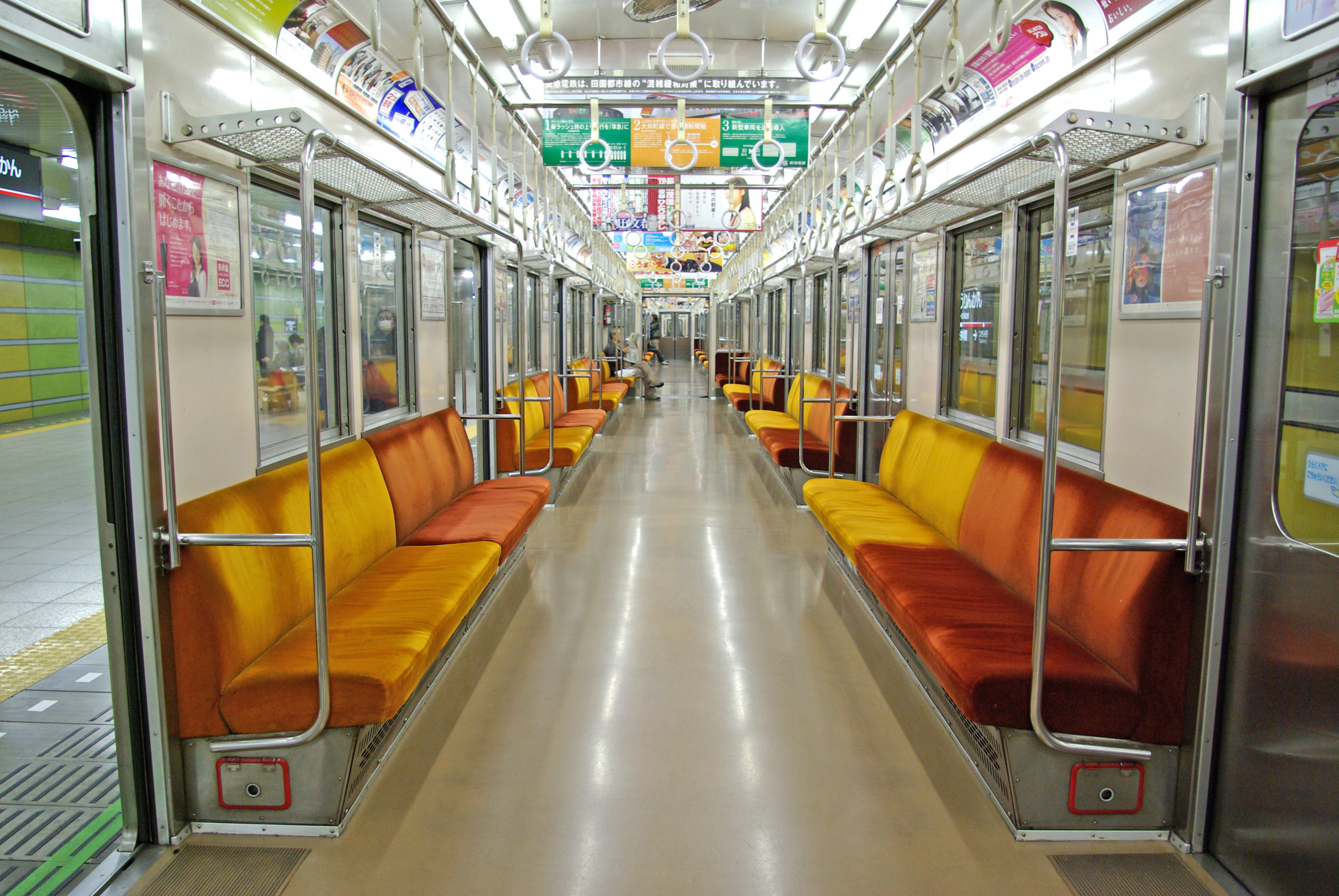 東急8500系 デハ8919号（9-2次車）車内